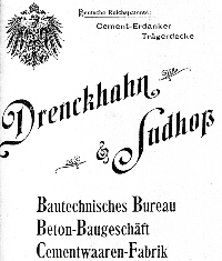 Umschlagseite eines Firmenprospektes